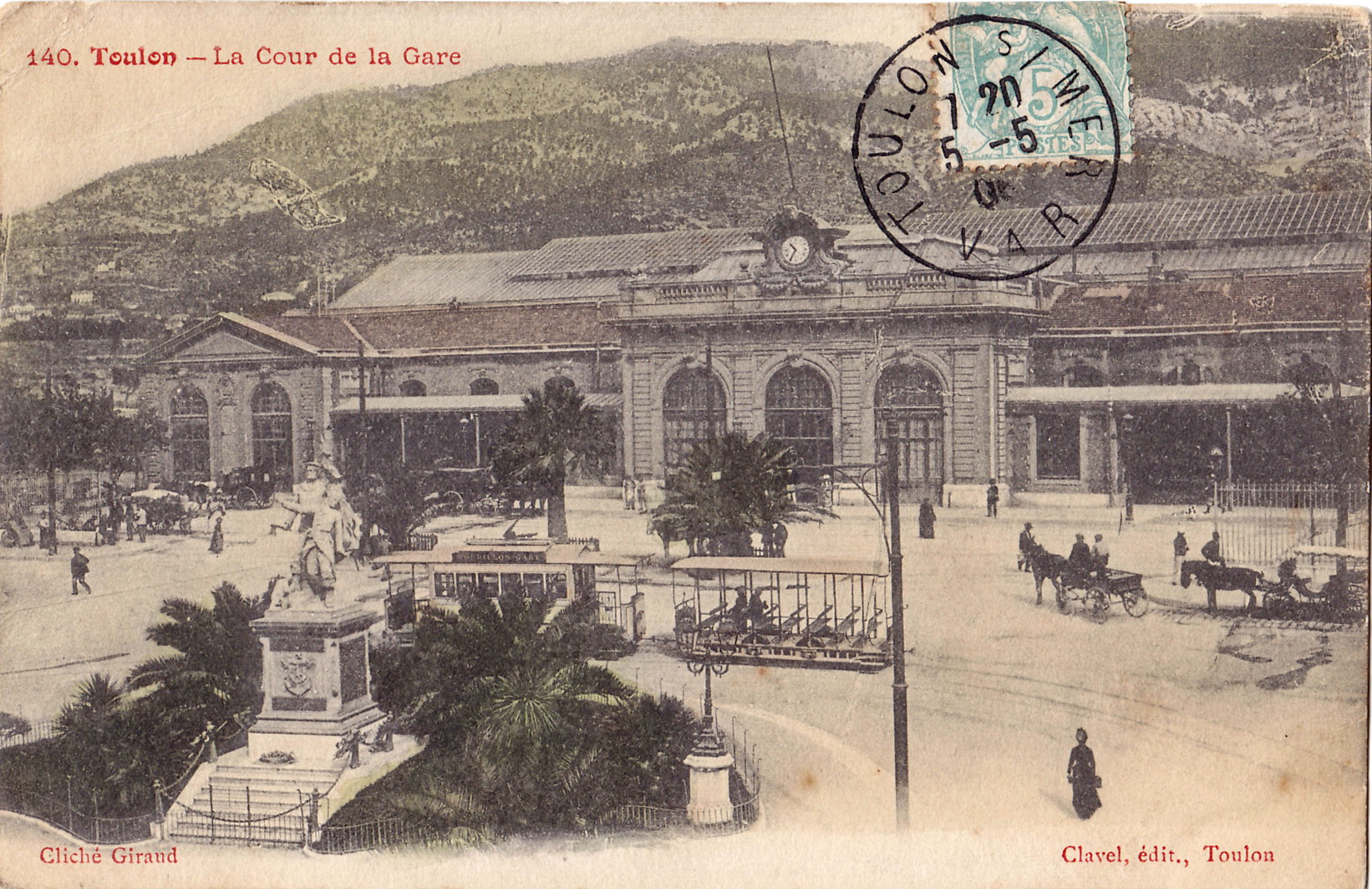 Carte postale ancienne éditée par Clavel à Toulon : Toulon - La Cour de la Gare